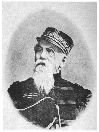 Fotografía oficial de Lucio V. Mansilla (1831 - 1913) en dominio público por muerte del autor hace más de 70 años